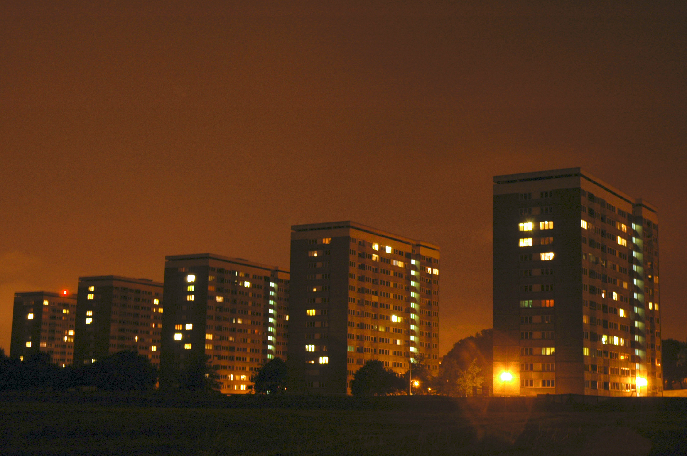 At night